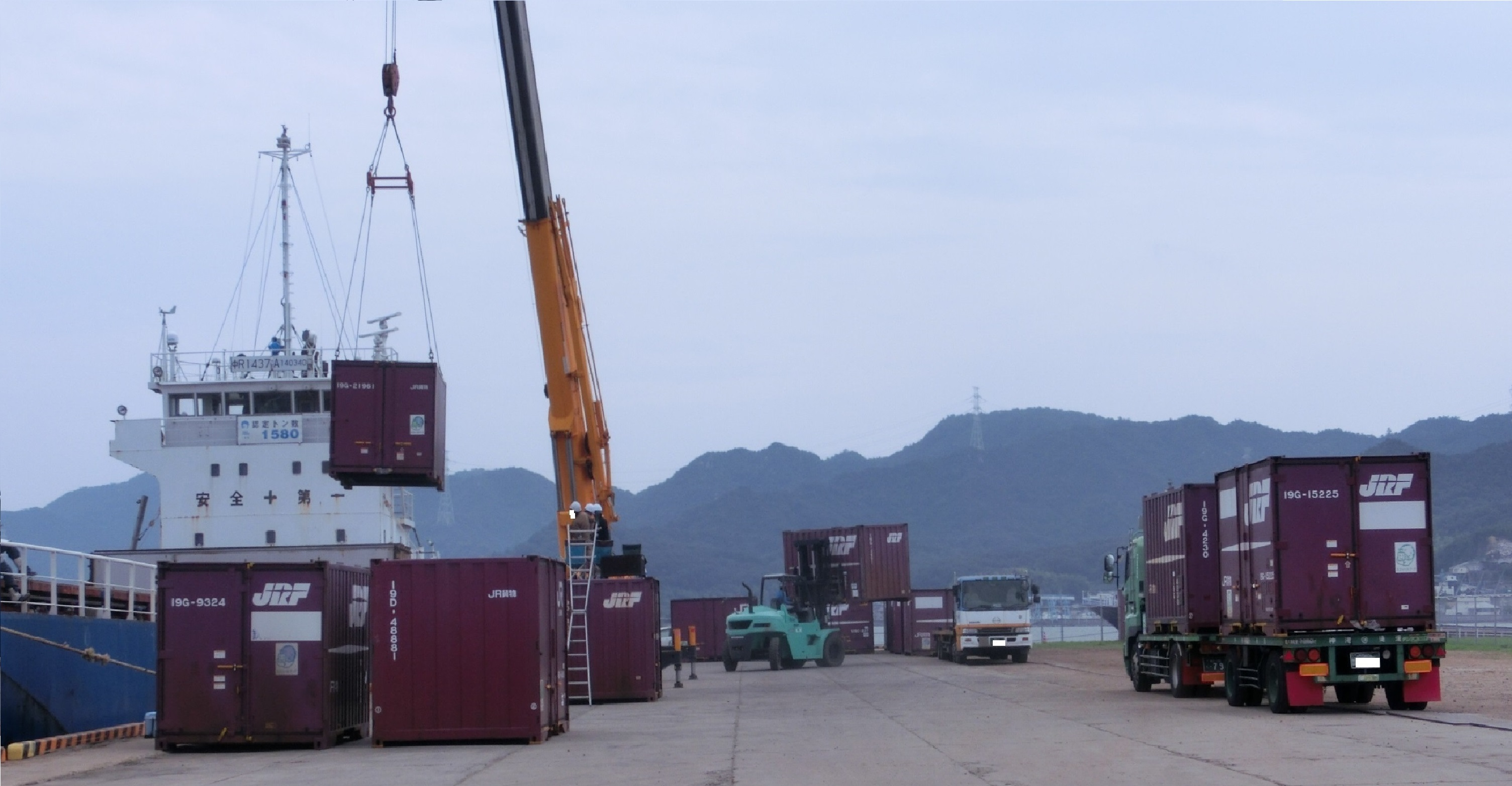 三度目の移転で広大な敷地と、完全に隔離され夜間留置の安全性が高まった岡山市東区にある 「 岡山新港高島埠頭 」 で、JR貨物所有の12ft形コンテナを船舶代行輸送する風景。 停泊している内航船で、北九州港へ一日一往復していた。 内航船の横に設置されたクレーン車で吊り作業を行い、コンテナの敷地内の移動は、二台の10t級フォークリフトで行う。 ＝＝＝＝＝＝＝＝【 総 括 】＝＝＝＝＝＝＝＝ 2018年 ( 平成30年 ) 7月5日 ( 木 ) から岡山県や広島県及び、山口県内の各地で発生した 「 平成３０年７月豪雨 」 の影響により、三県内の山陽本線で複数個所において、線路喪失を含む大規模な輸送障害が三ヶ月以上にわたり発生した。 これに伴い、元々岡山県内の拠点となっている 「 JR貨物岡山(タ) 」 が今回の輸送障害区間では、事実上の東側の終着点駅となり、この影響で福山通運の30ftコンテナのみを一列車貸切っている 「 福山レールエクスプレス号 」 積載の全コンテナを始め、全国からの九州地区向けの大口宅配や冷凍などで大量に扱われていた20ft及び、30ftの大型コンテナを全て 「 岡山(タ) 」 で臨時に取り扱うこととなった。 「 岡山(タ) 」 ではこれらの大型コンテナを最優先輸送させる為に、広島や山口へのトラック代行輸送する臨時便が一気に集中し、荷役能力の逼迫となってしまった。 また岡山県内の水島臨海鉄道の拠点コンテナ駅である 「 東水島駅 」 への関東からの定期列車は、本来はこの 「 岡山(タ) 」 で一部のコンテナの取り卸と、機関車を付け替えてから 「 東水島駅 」 へ中継輸送していたので、この関東便に関してはさほど問題は無かったが、 通常の 「 東水島駅 」 から 「 岡山(タ) 」 で中継して九州向けのルートが絶たれてしまった。 この打開策として、 「 東水島駅 」 ～ 九州向けの入出荷ルートと、近隣の 「 姫路貨物駅 」 や 「 神戸(タ) 」 での置き去り気味で滞留し続ける12ft形5tコンテナ （ 私有コンテナを除く ） の輸送を確保するために、船舶を利用した 「 災害時の鉄道代行輸送 」 ルートとして、中国地区としては初めてとなる福岡県 「 北九州港 」 までの船舶輸送が始まった。 担当港は、「 東水島駅 」 の最寄港となる 「 水島港 」 を利用すれば一番効率もよく、また駅から港までの輸送費も抑えられるが、当初予想されていた約四ヶ月もの期間を一貫して使用できる用地の確保する見通しがたたず、緊急暫定的処置として、初日の7月18日 ～ 約一週間程度の短期間を、地元の水島港 （ 実地港区は不明 ） で取り扱うこととなった。 7月下旬からは、荷役埠頭敷地や荷役設備の受け入れ準備が整った、東水島駅から陸路で約30キロ離れた岡山市南区の 「 岡山港福島埠頭 (ゲートも無く出入り自由地区) 」 で、8月31日までの期限付きで着地港の変更無く 「 水島港 」 から引き継がれてた。 更に9月1日からは、積み残しや陸路の輸送待ちで安全に夜間でも留置できる設備の確保として、荷役埠頭がフェンスで完全に区画管理されて専用使用できる、陸路で約三キロ離れた河口対岸の岡山市東区にある 「 岡山新港高島埠頭 」 へ、再度移転して一連の代行輸送が最終日となる、9月28日の下り便の出航まで続いていた。